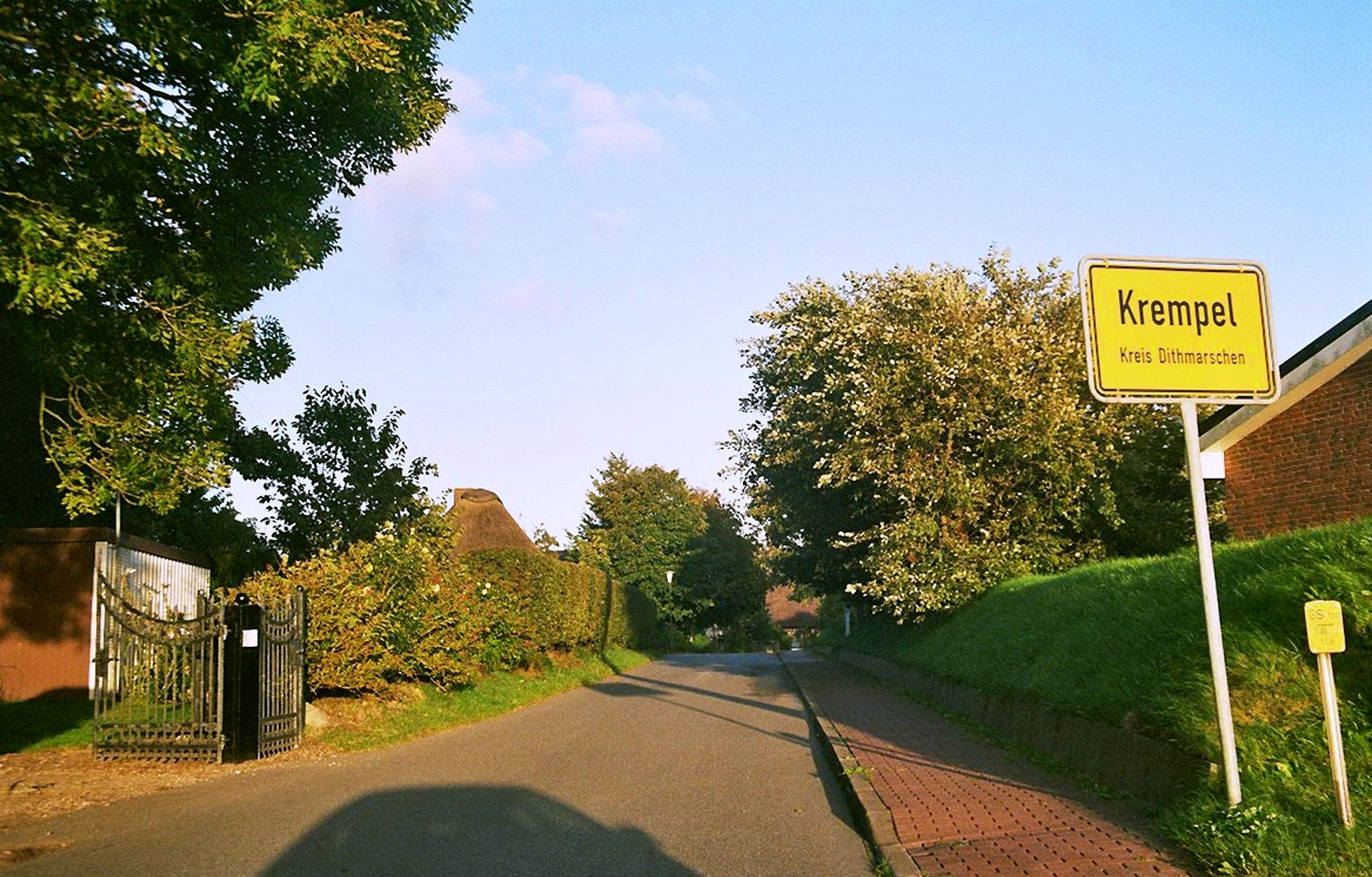 Ortsschild von Krempel made by WikiTour 2005